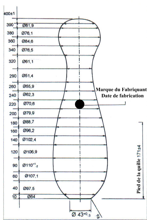 Nouvelle quille des jeux de quille classic